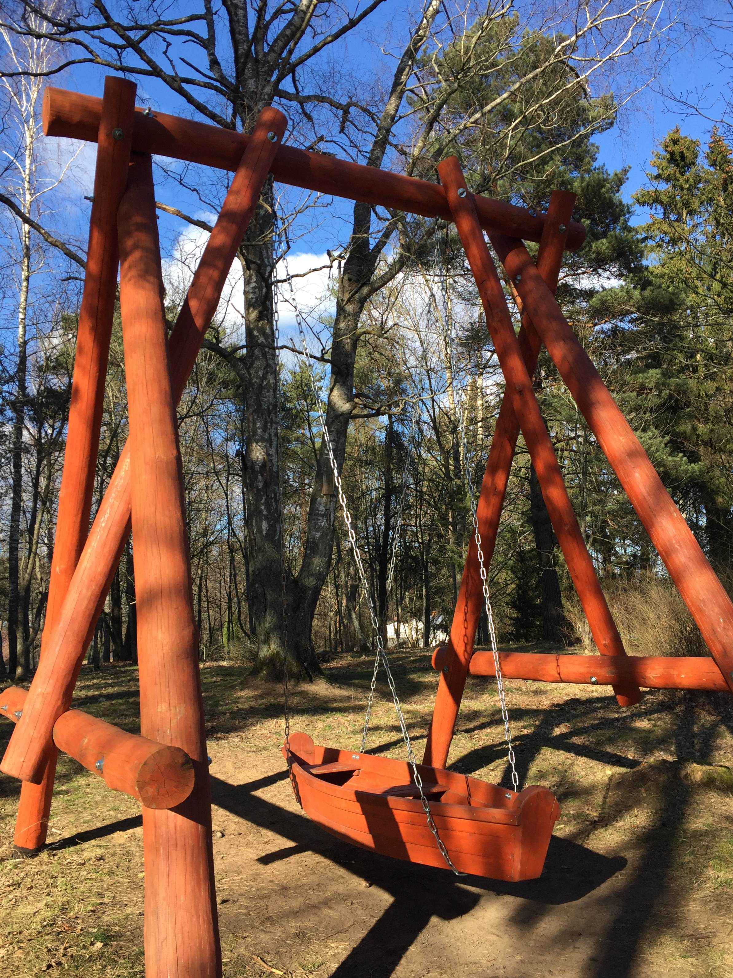 Šūpoles Alderu parkā, 2020-03-22